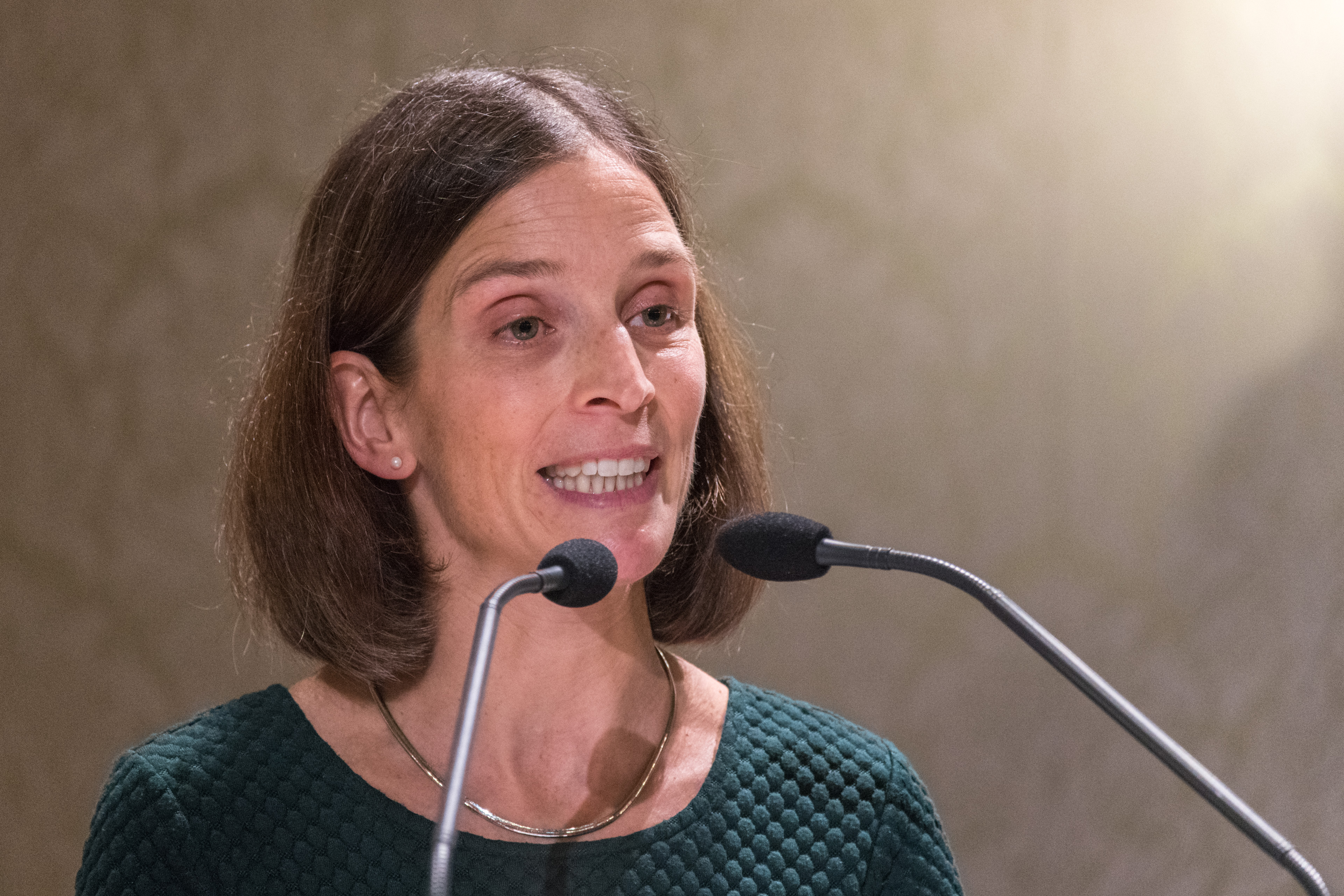 Verleihung des Heinrich-Gleißner-Preises 2018 am 14. Jänner 2019 in den Redoutensälen Linz